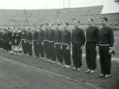 Vriendschappelijke voetbalwedstrijd Nederland - België 1-0 (rust 1-0) in het Olympisch Stadion in Amsterdam. Nederlands voetbalelftal.